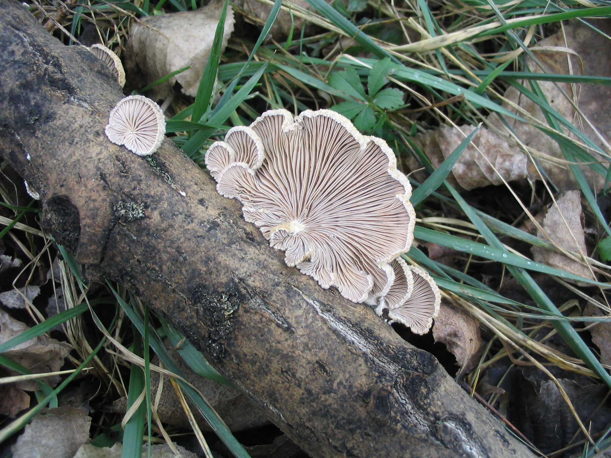 Spaltblättling, Schizophyllum commune an Laubholz (Pappel) aufgenommen am 28.01.2007 in der Rheinaue bei Ingelheim von Dr. Hagen Graebner